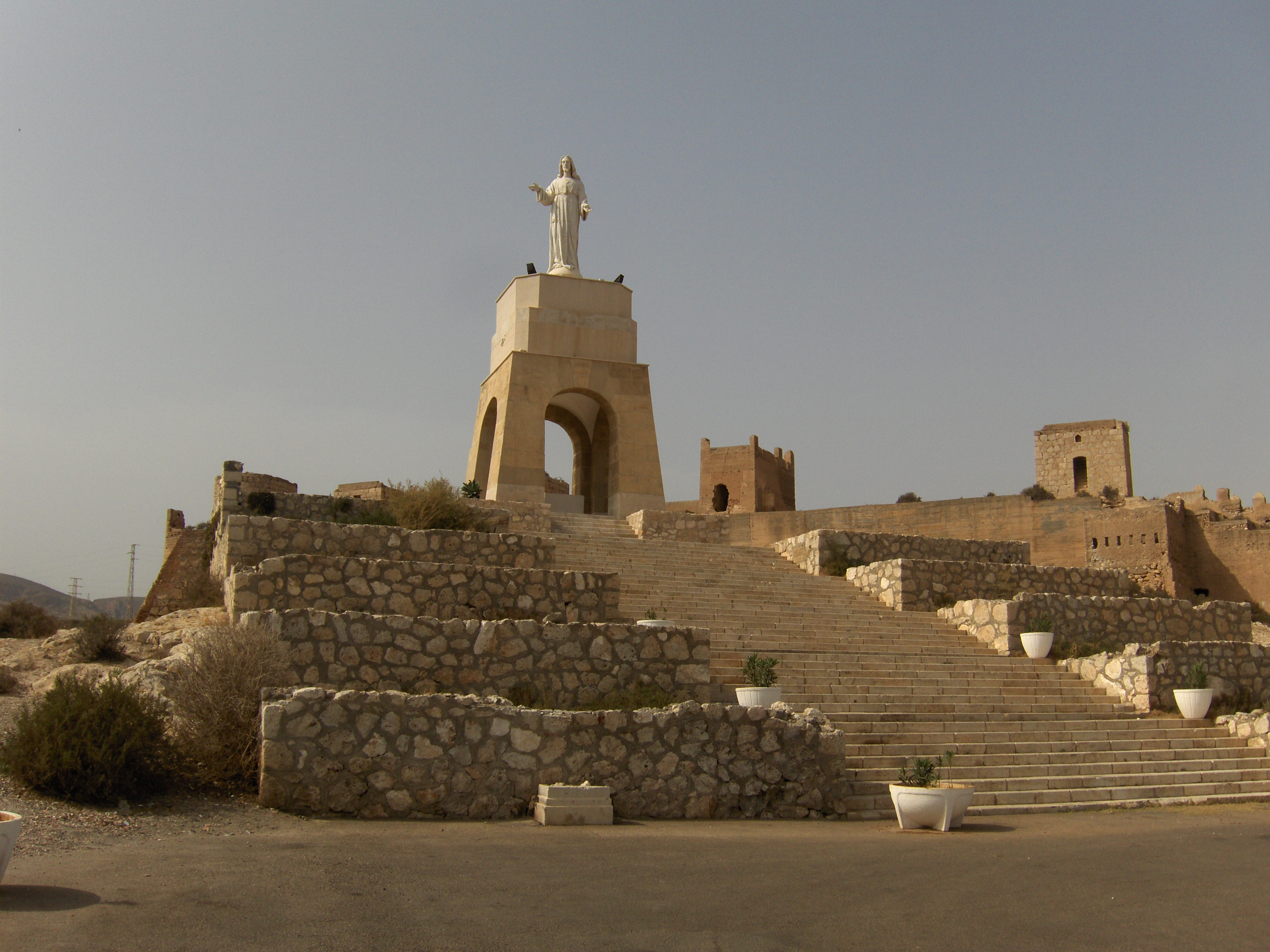 Vista del monumento a San Cristóbal, en Almería